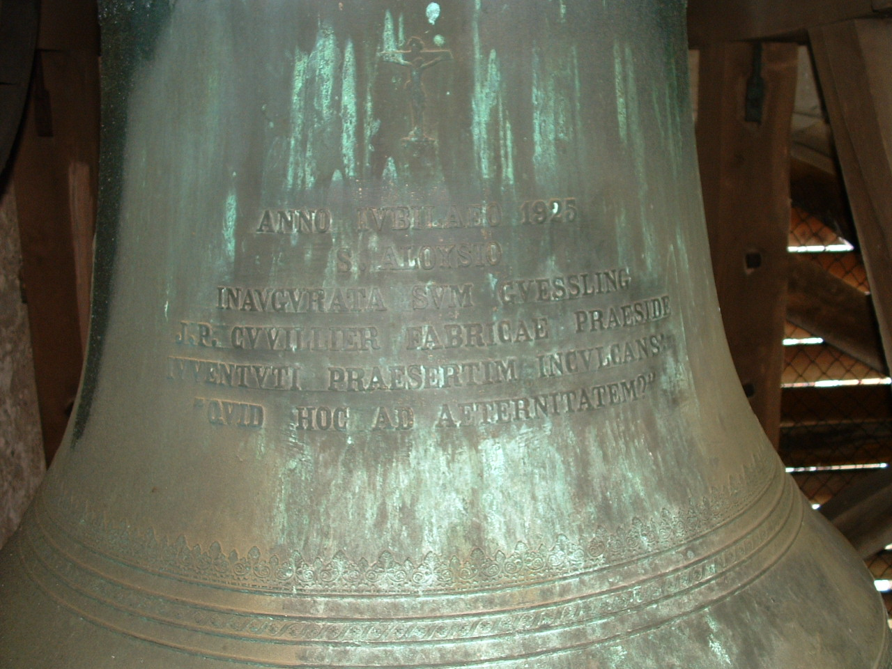 Cloche de l'église de Guessling-Hemering